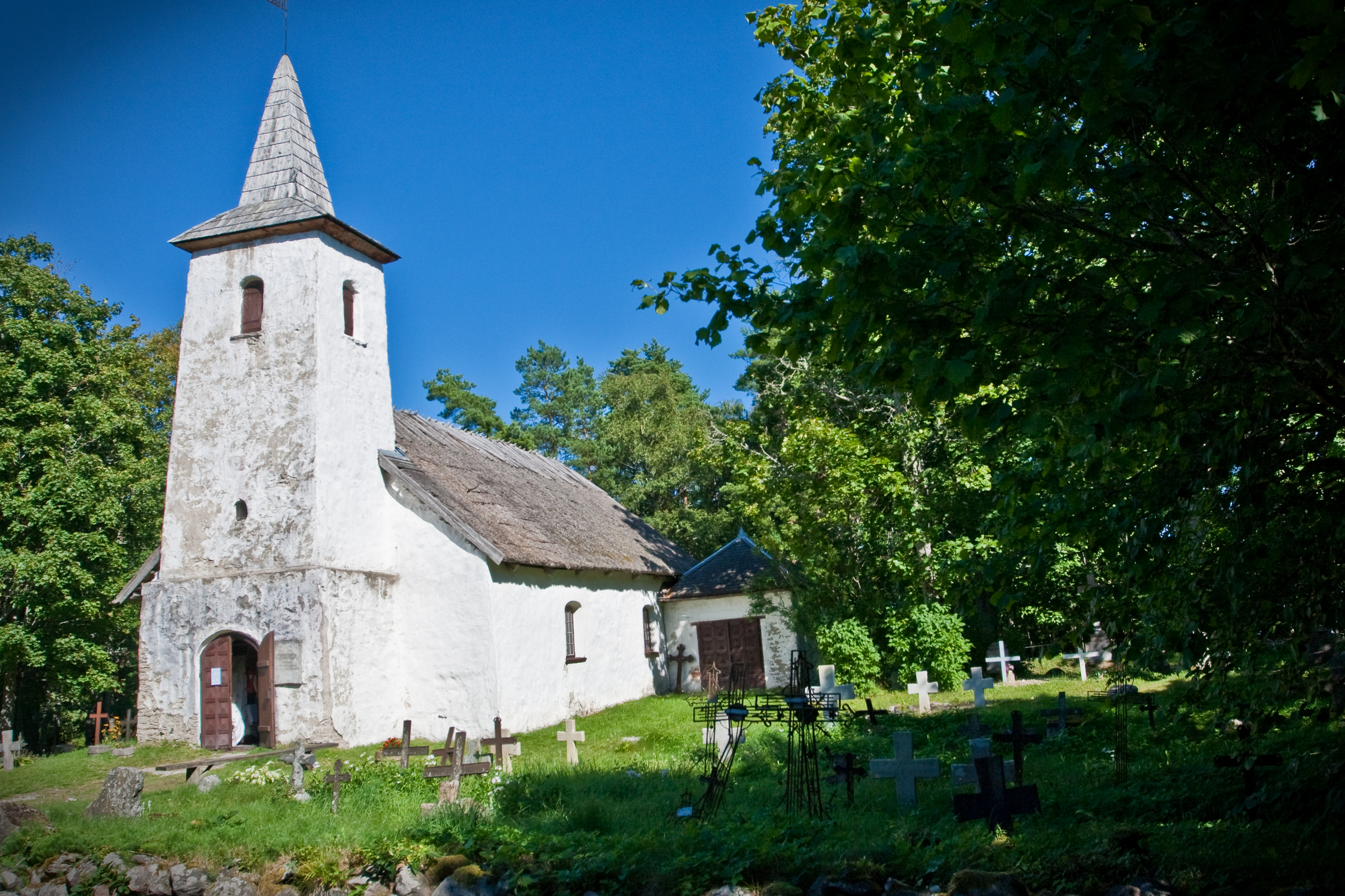 Kassari chapel on Kassari island, Estonia.